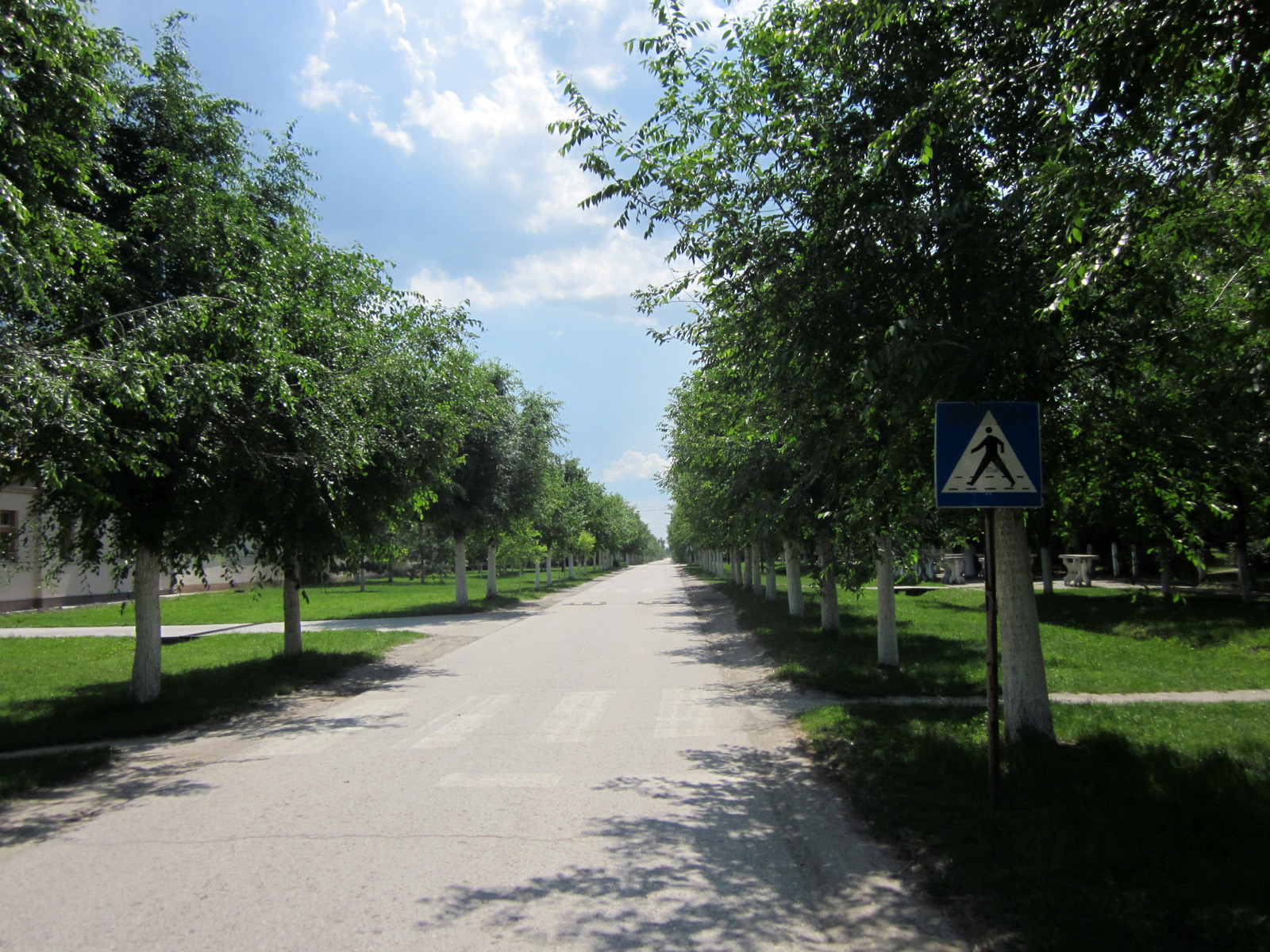 Belo Blato (Бело Блато), Serbia